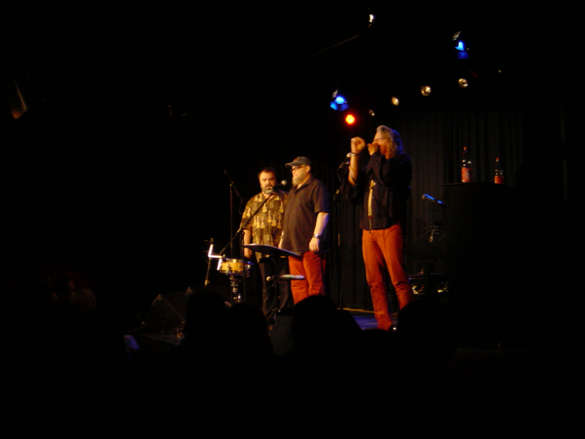 MTS beim Auftritt in Pirna, Kleinkunstbühne Q24 (Thomas Schmitt, Mike Schafmeier, Frank Sültemeyer)